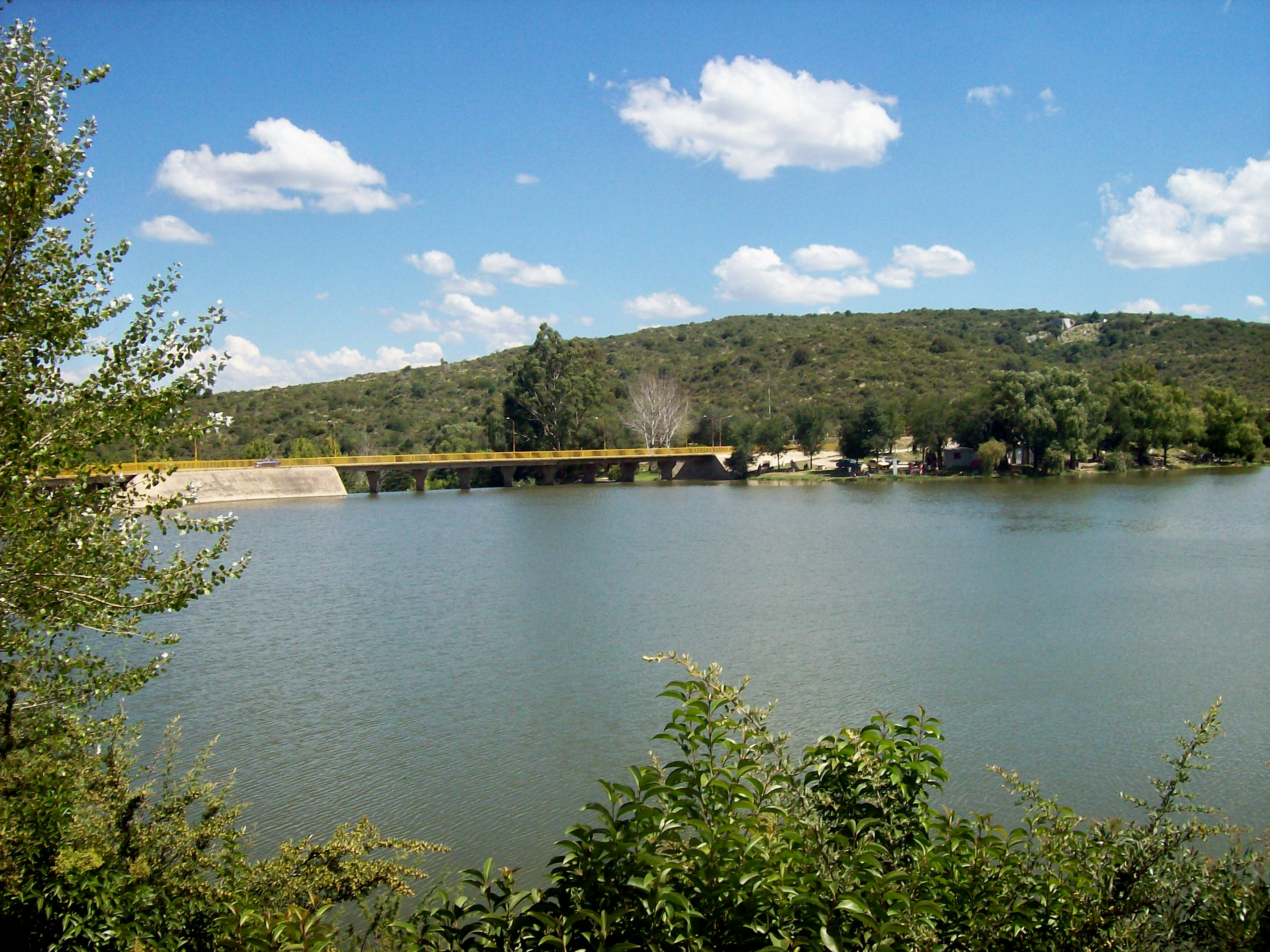 Dique La Falda, en la ciudad homónima, pcia. de Córdoba, Argentina.